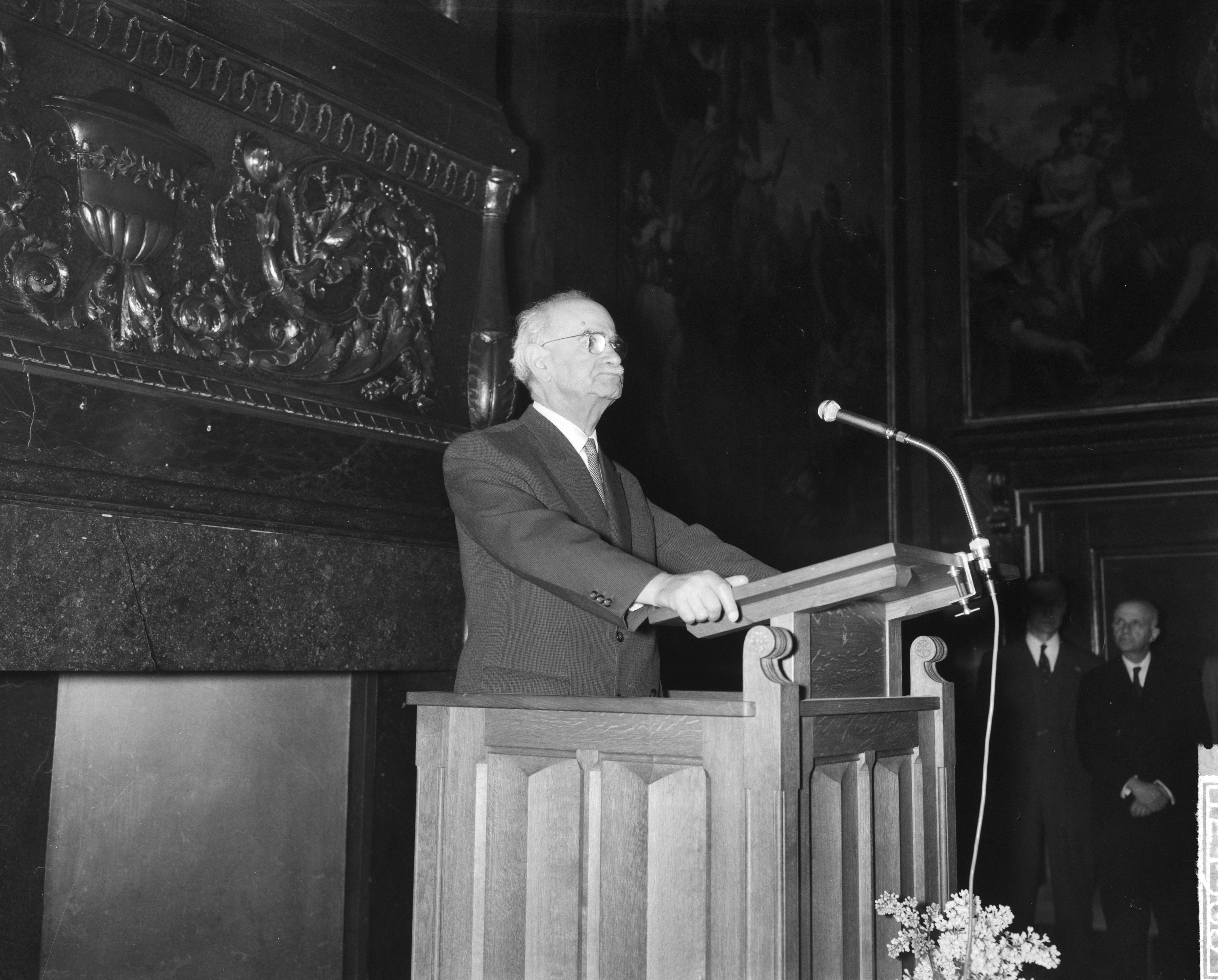 Collectie / Archief : Fotocollectie Anefo Reportage / Serie : [ onbekend ] Beschrijving : Opening Tentoonstelling "Berlijn bolwerk der vrijheid" door dr. J. Lons Datum : 1 maart 1961 Trefwoorden : Openingen Persoonsnaam : dr. J. Lons Fotograaf : Bilsen, Joop van / Anefo Auteursrechthebbende : Nationaal Archief Materiaalsoort : Negatief (zwart/wit) Nummer archiefinventaris : bekijk toegang 2.24.01.04 Bestanddeelnummer : 912-1588